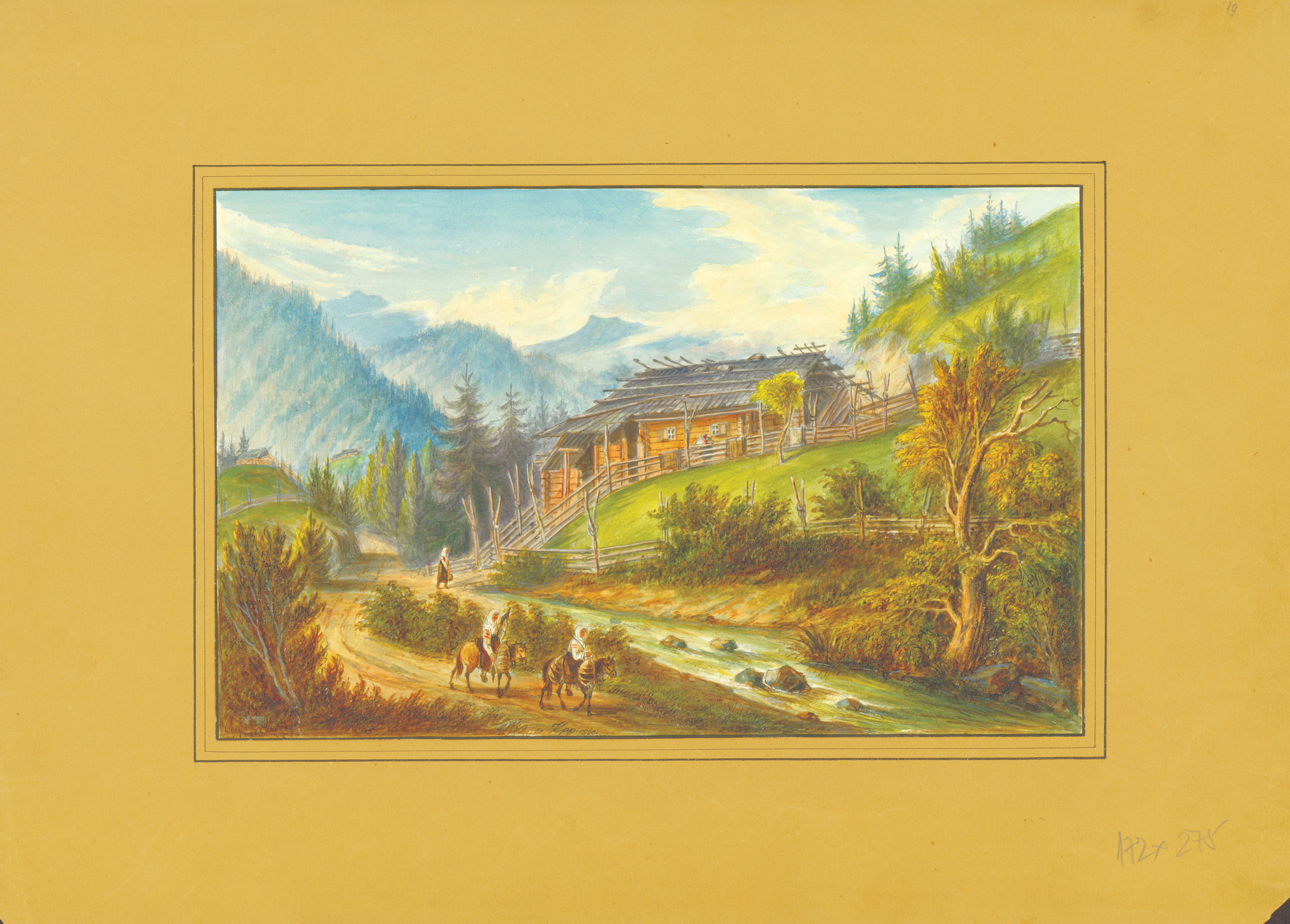 Гуцульська гражда: Гуцульська гражда